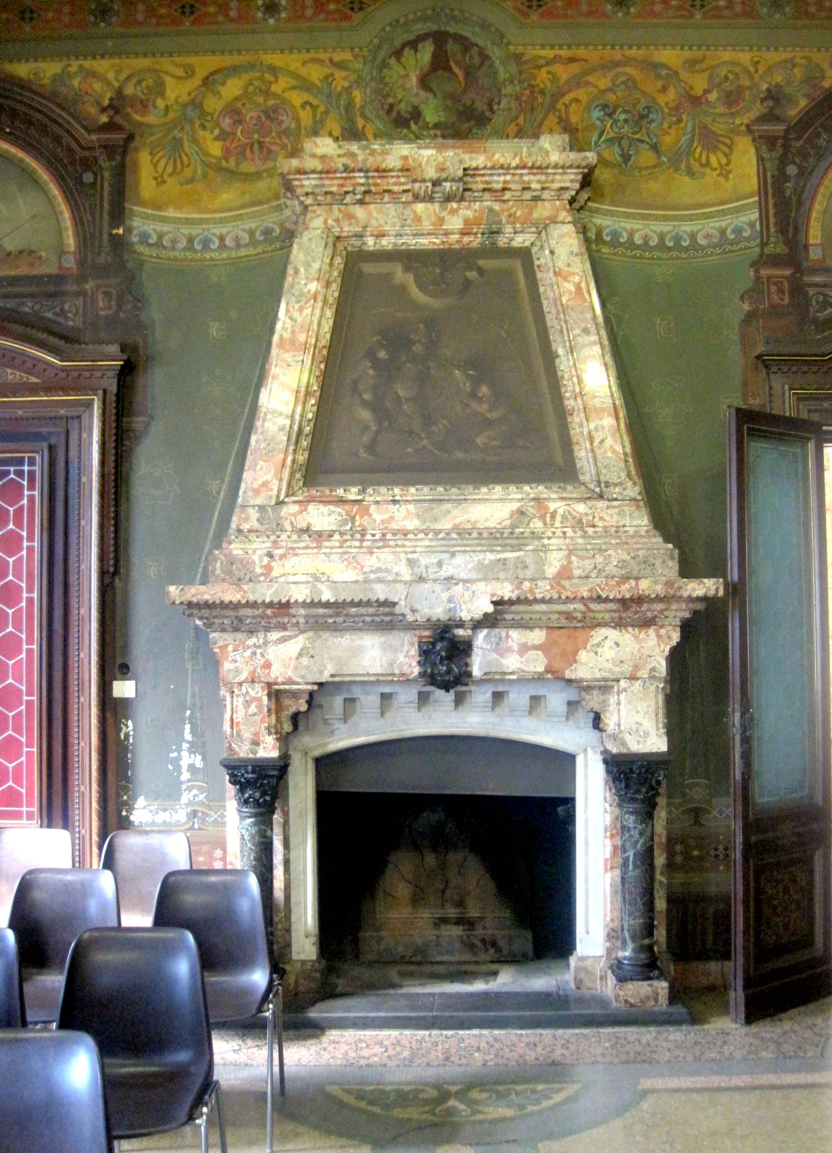 Villa Ottolini-Tosi This is a photo of a monument which is part of cultural heritage of Italy.